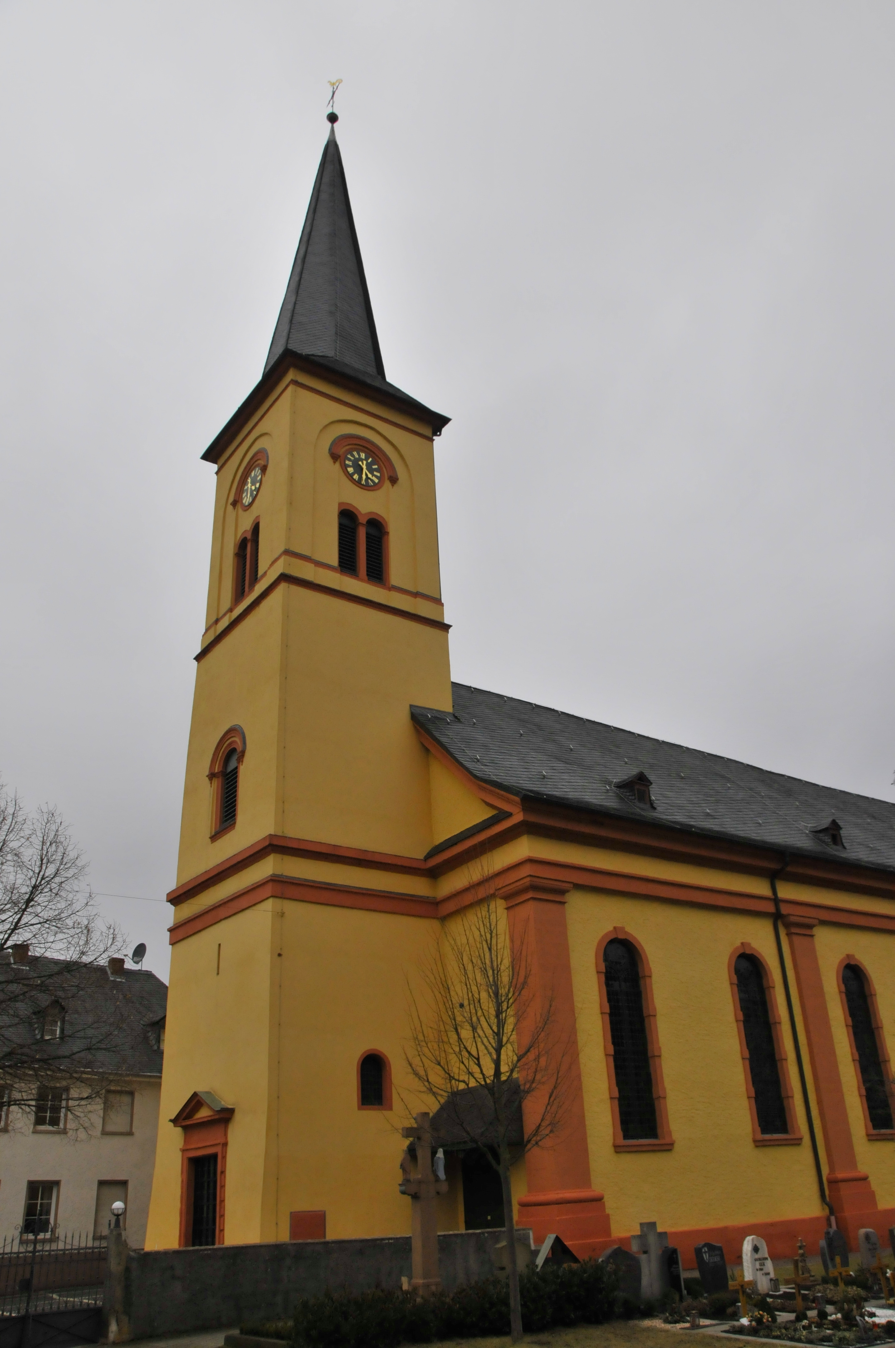 Trittenheim, Michaeliskirche